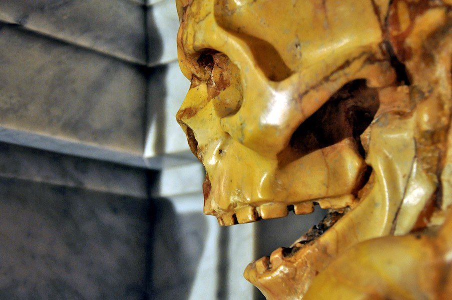 Memento-mori-Darstellung